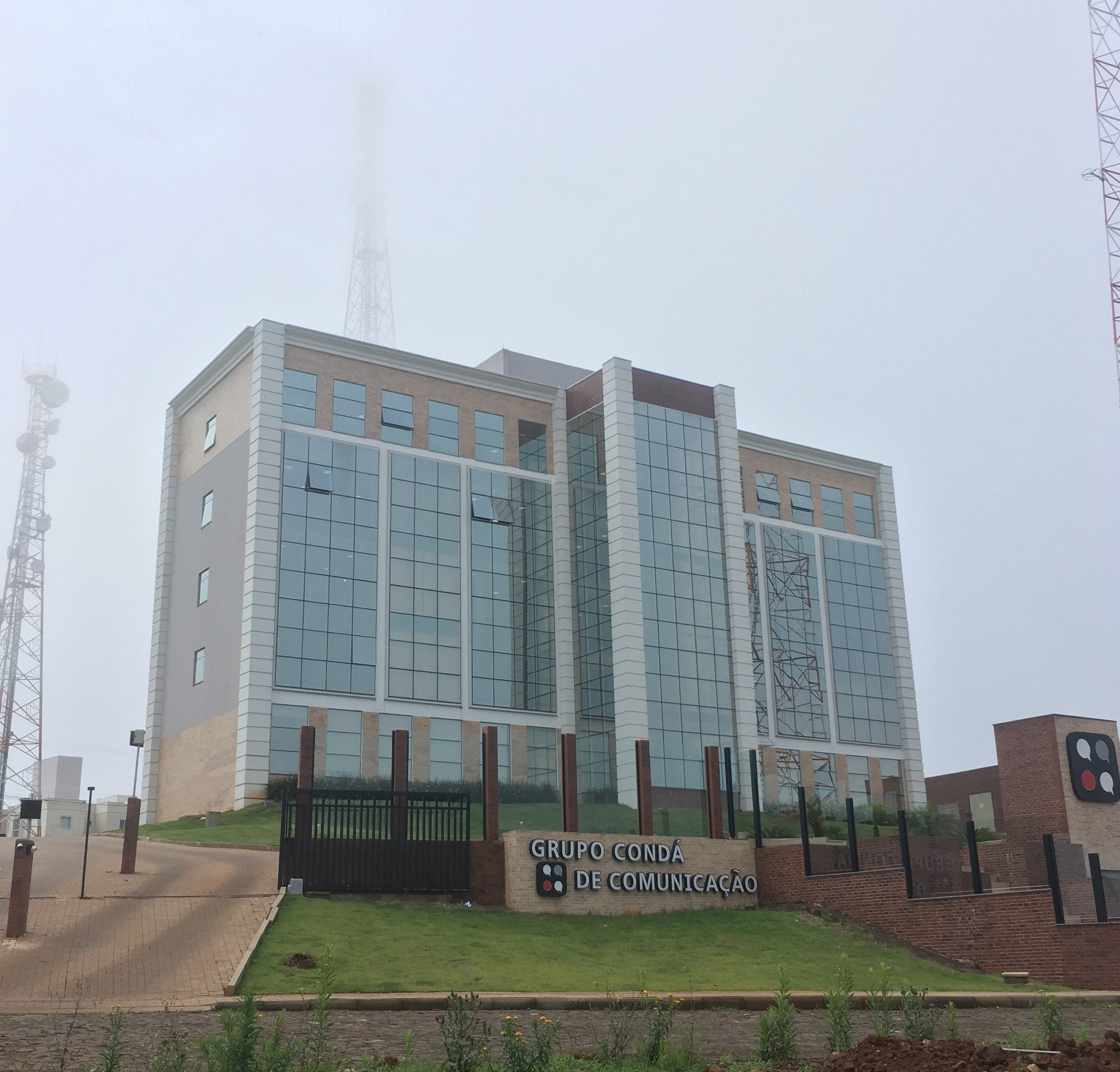 Prédio do Grupo Condá de Comunicação